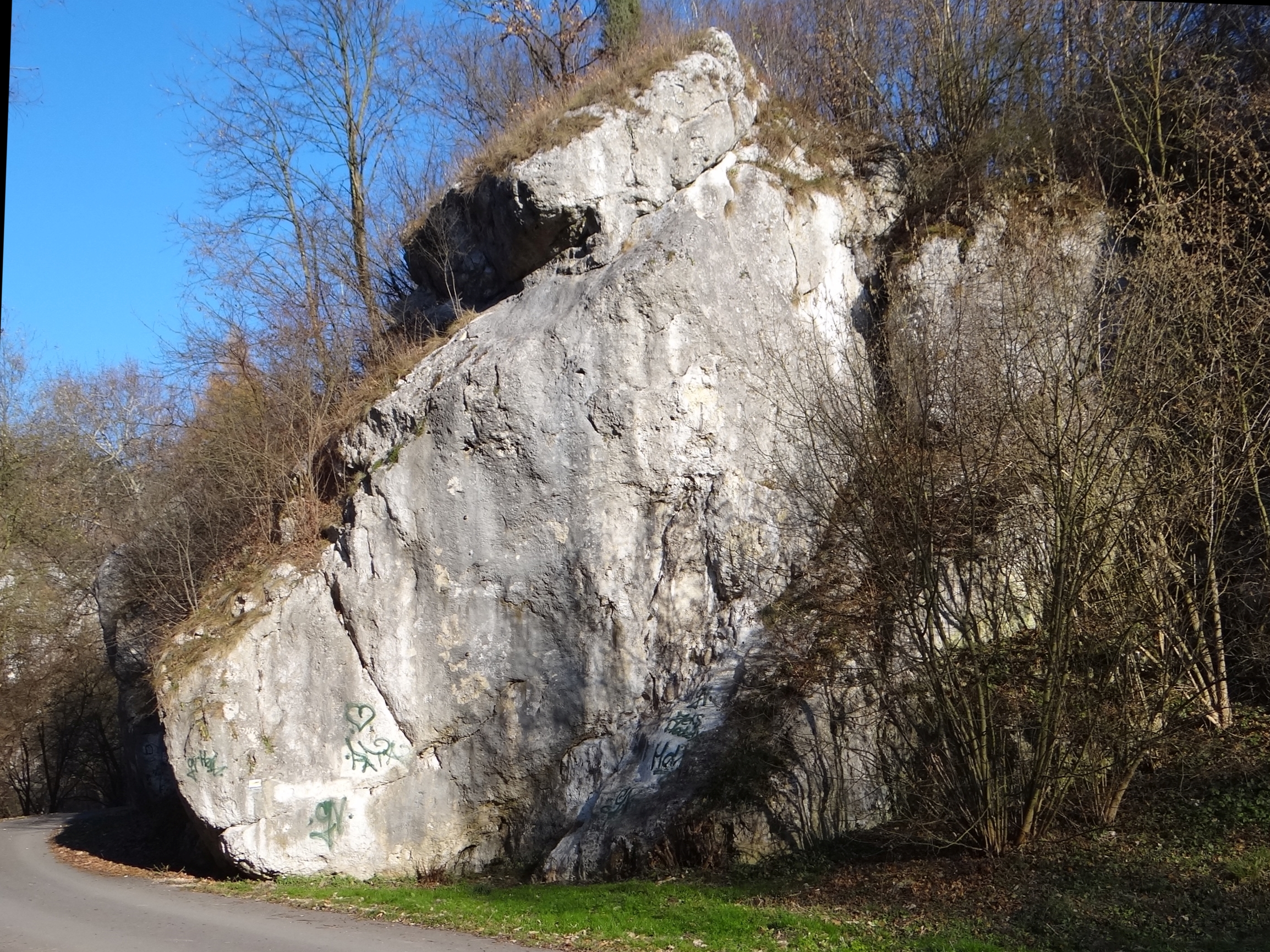 Przydrożne Skały w Dolinie Kobylańskiej. Skała 3